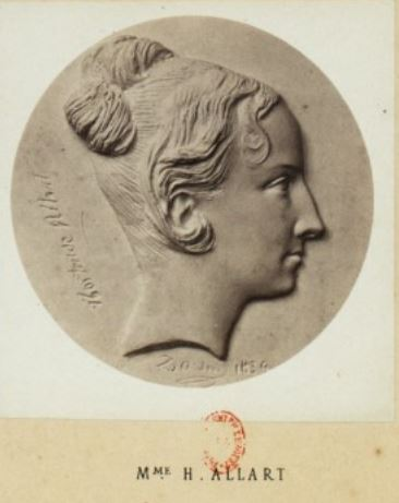 Hortense Allart, écrivaine (1801-1879) médaillon par David d'Angers, Pierre-Jean (1788-1856) in Les médaillons de David d'Angers réunis et publiés par son fils David d'Angers, Robert (1833-1912). 1867